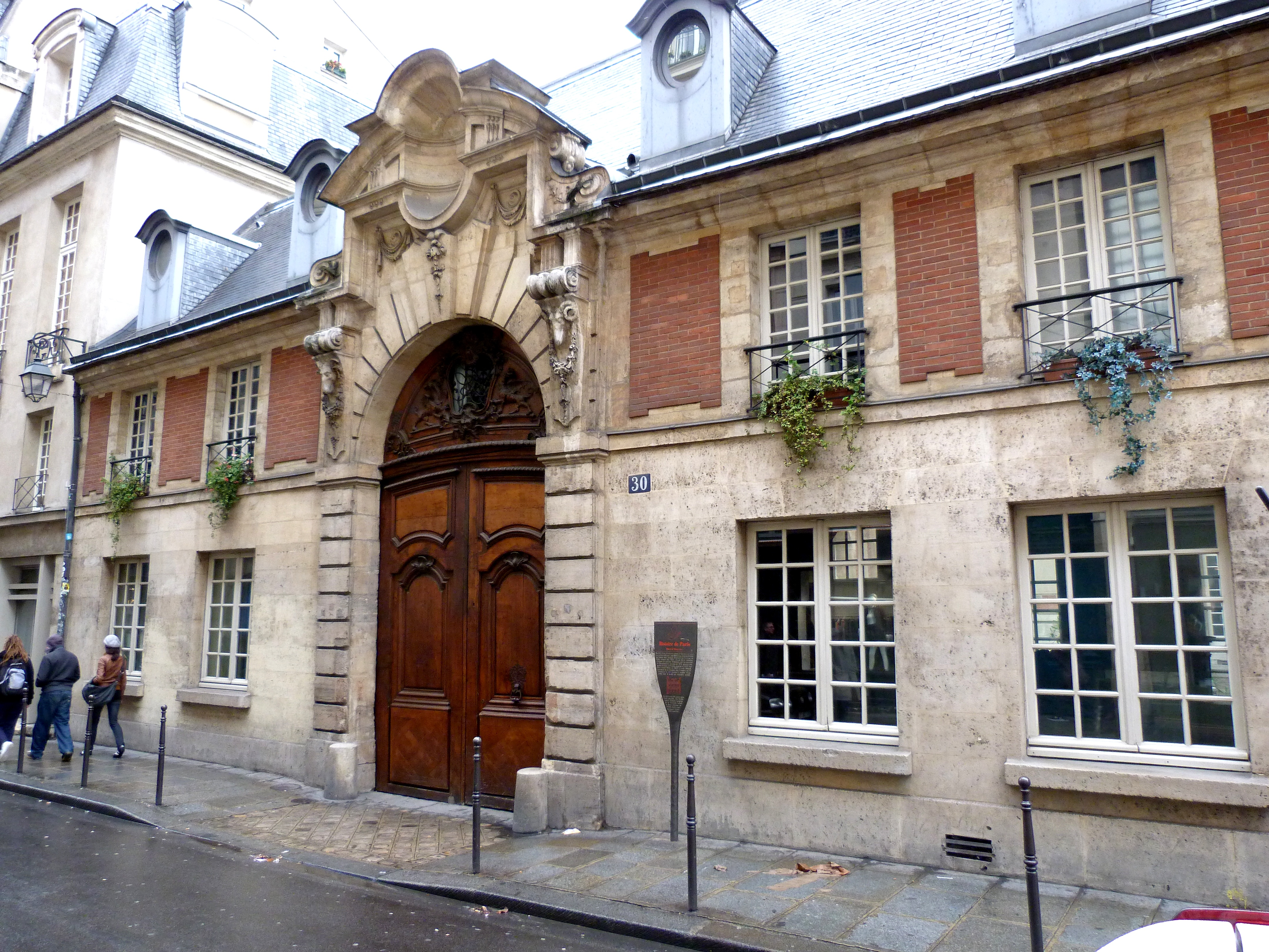 Hôtel d'Alméras ou d'Almeyras (ancien hôtel de Fourcy), n° 30, rue des Francs-Bourgeois, Paris (3e arrondissemnet). Façade sur la rue.